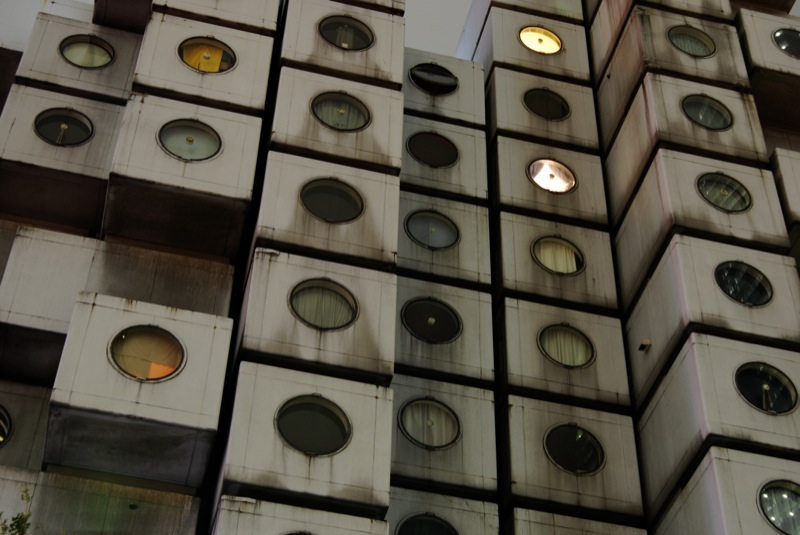 中銀カプセルタワービル